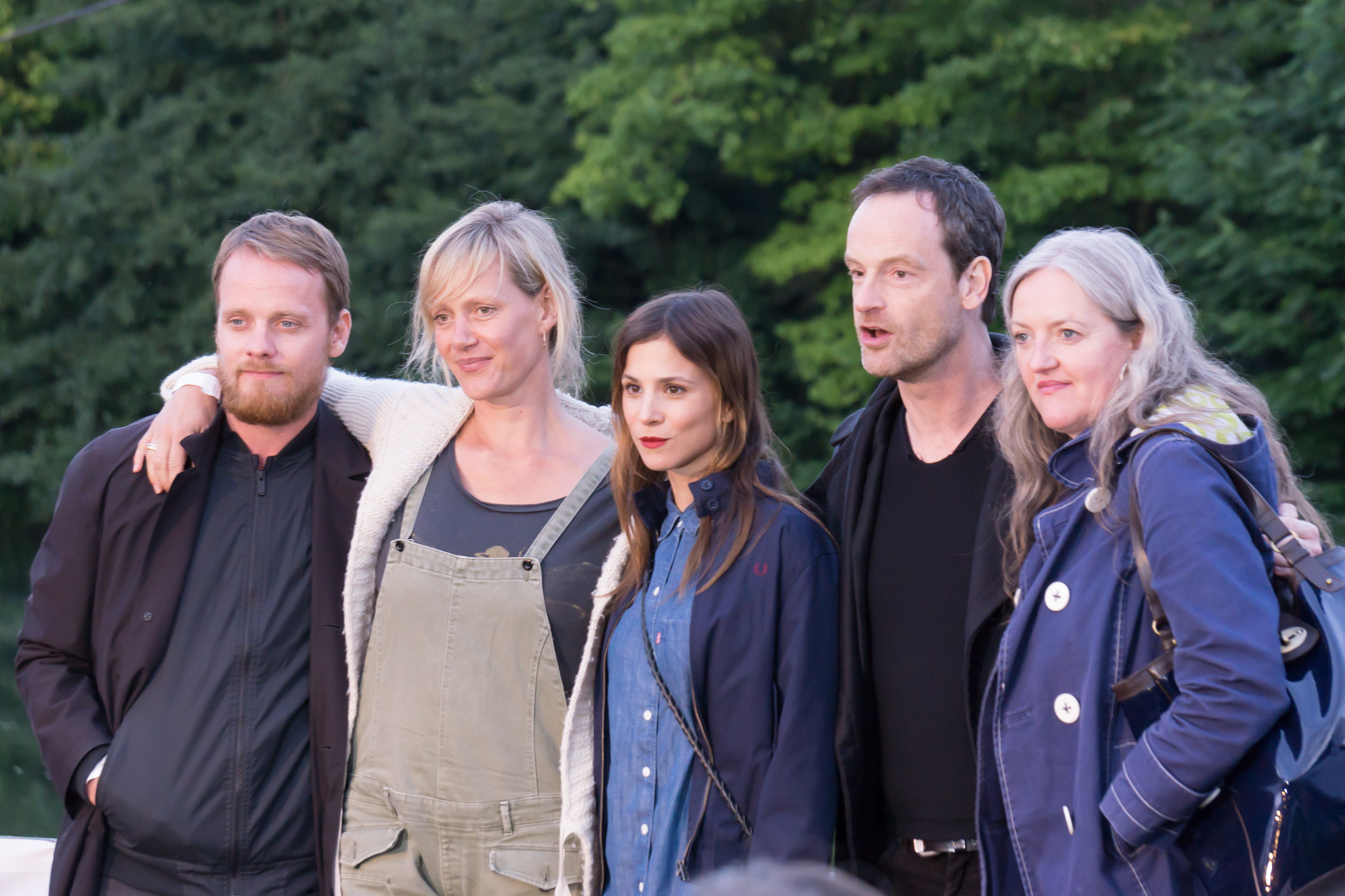 Tatort-Dortmund, Vorpremiere für die Folge 9 "Zahltag" beim Openairkino im Westfalenpark: Stefan Konarske ( Daniel Kossik), Anna Schudt (Martina Bönisch), Aylin TezelAylin Tezel (Nora Dalay), Jörg Hartmann (Peter Faber)